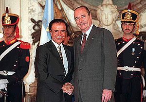 PRESIDENTE DE LA REPUBLICA DE FRANCIA, JACQUES CHIRAC fue recibido por el PRESIDENTE DE LA REPUBLICA ARGENTINA, DR. CARLOS SAUL MENEM.